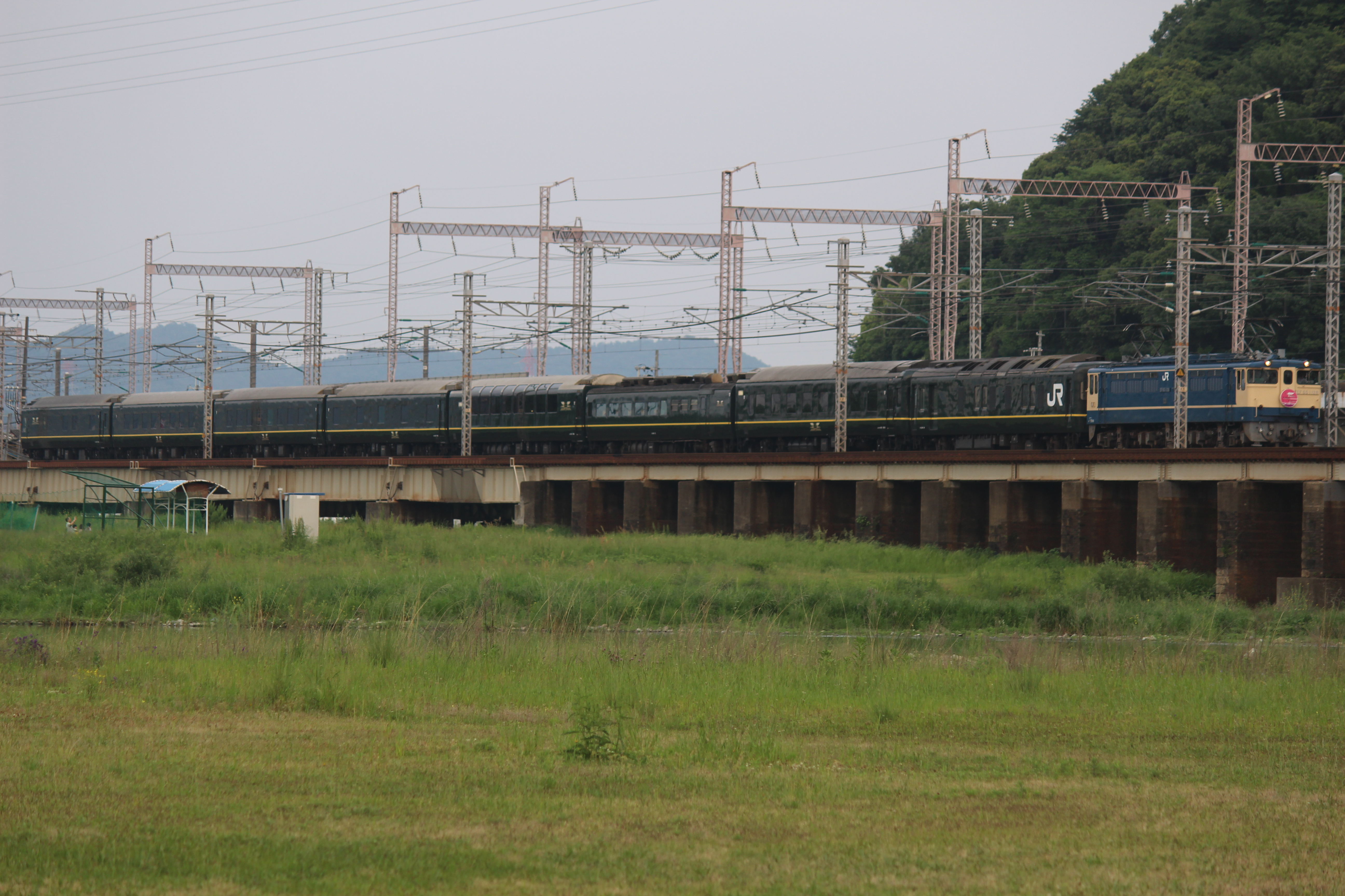 団体用に組み替えられた編成。